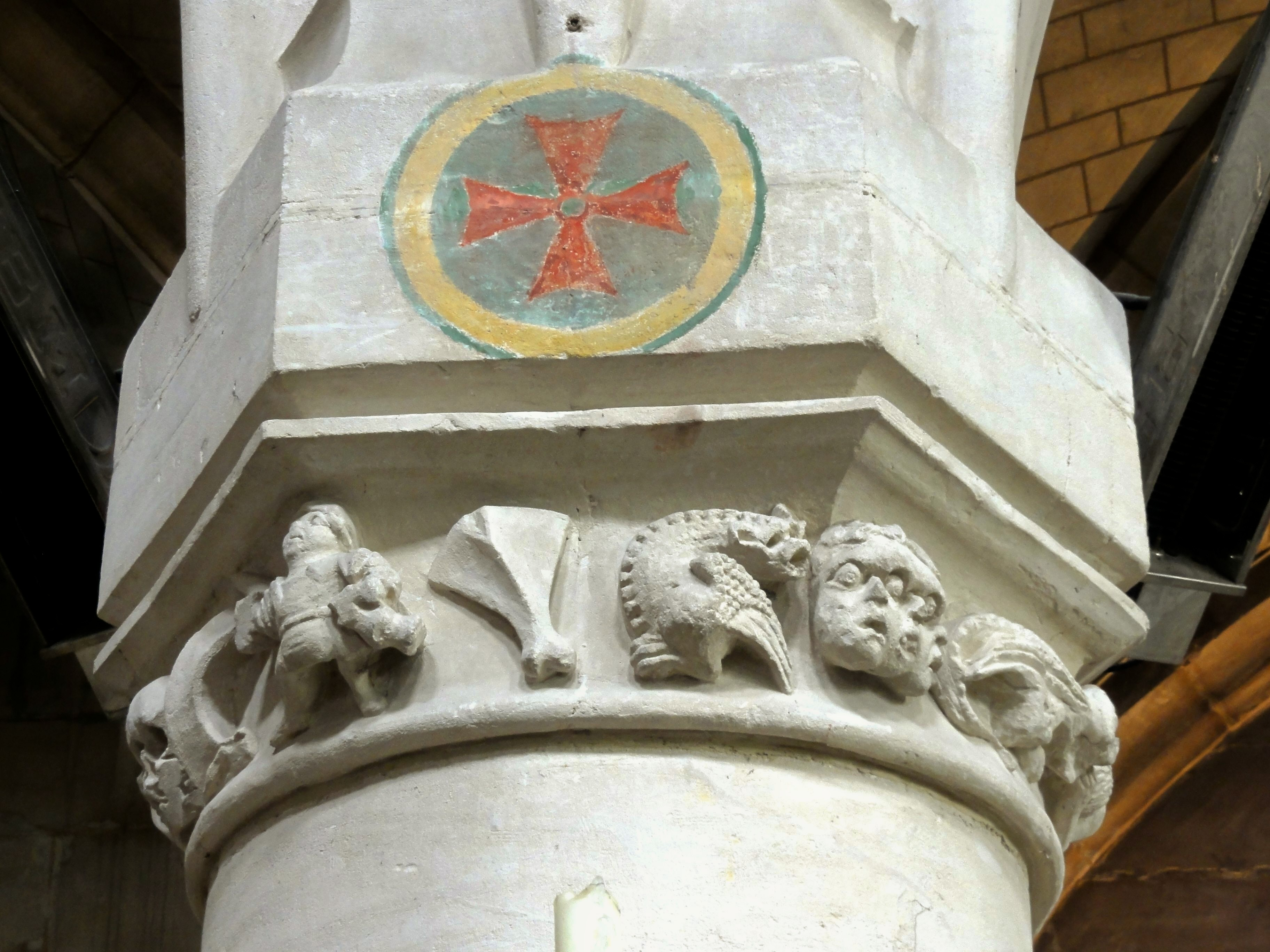 Nef, deuxième pilier au nord.